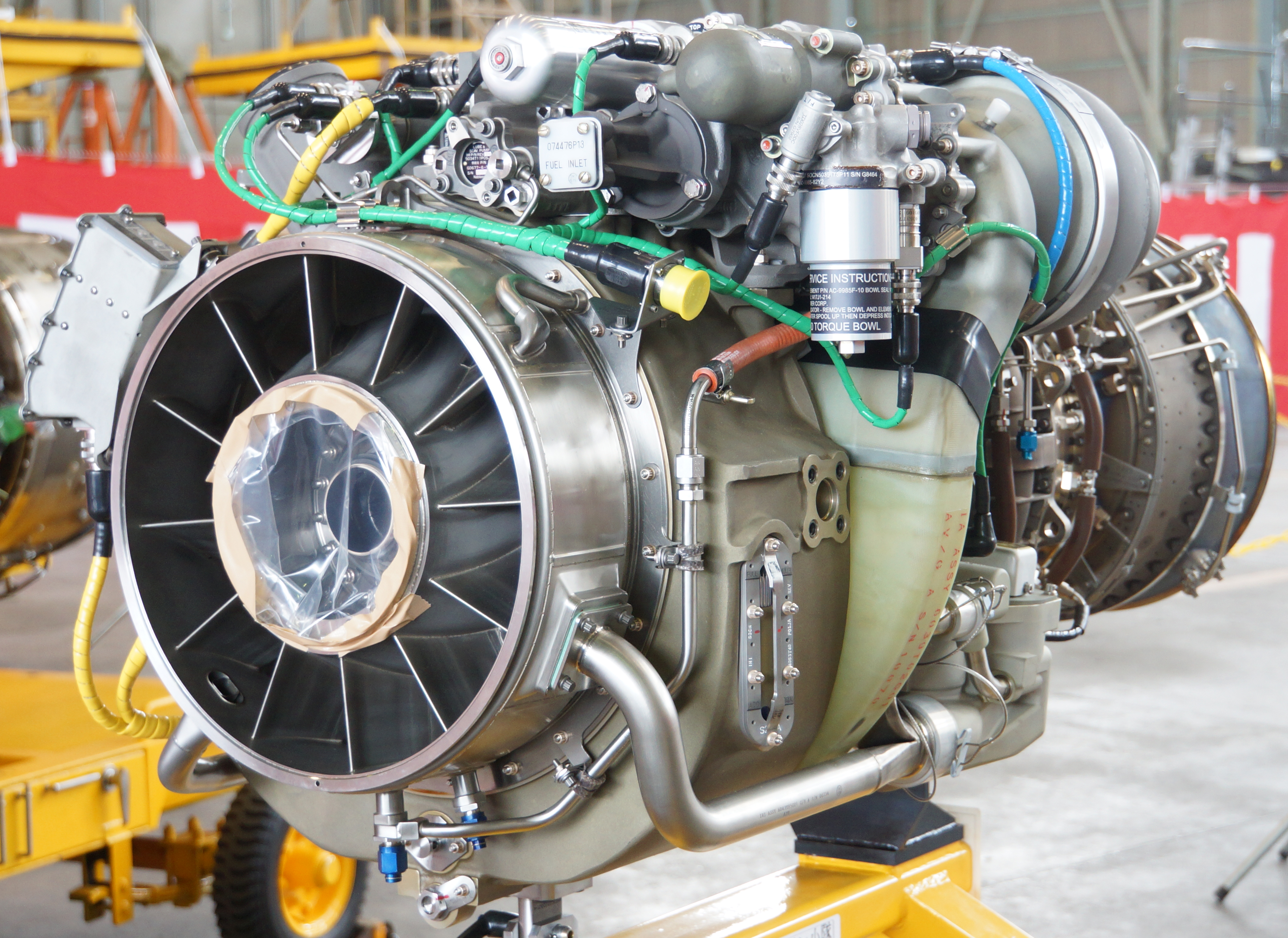 T700-IHI-401Cターボシャフトエンジン（UH-60J用） 左前面。2016年3月13日 航空自衛隊小牧基地にて。